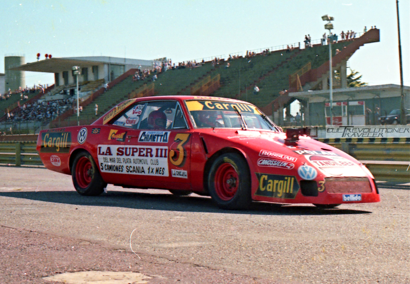 Oscar Castellano saliendo de boxes en Bs. As. con la Dodge GTX #3